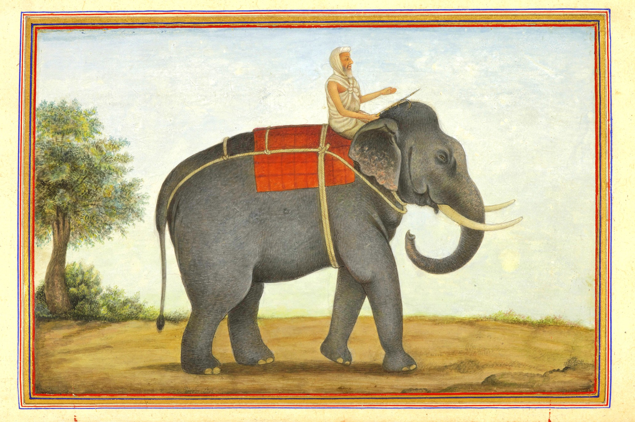 An elephant keeper riding his elephant.